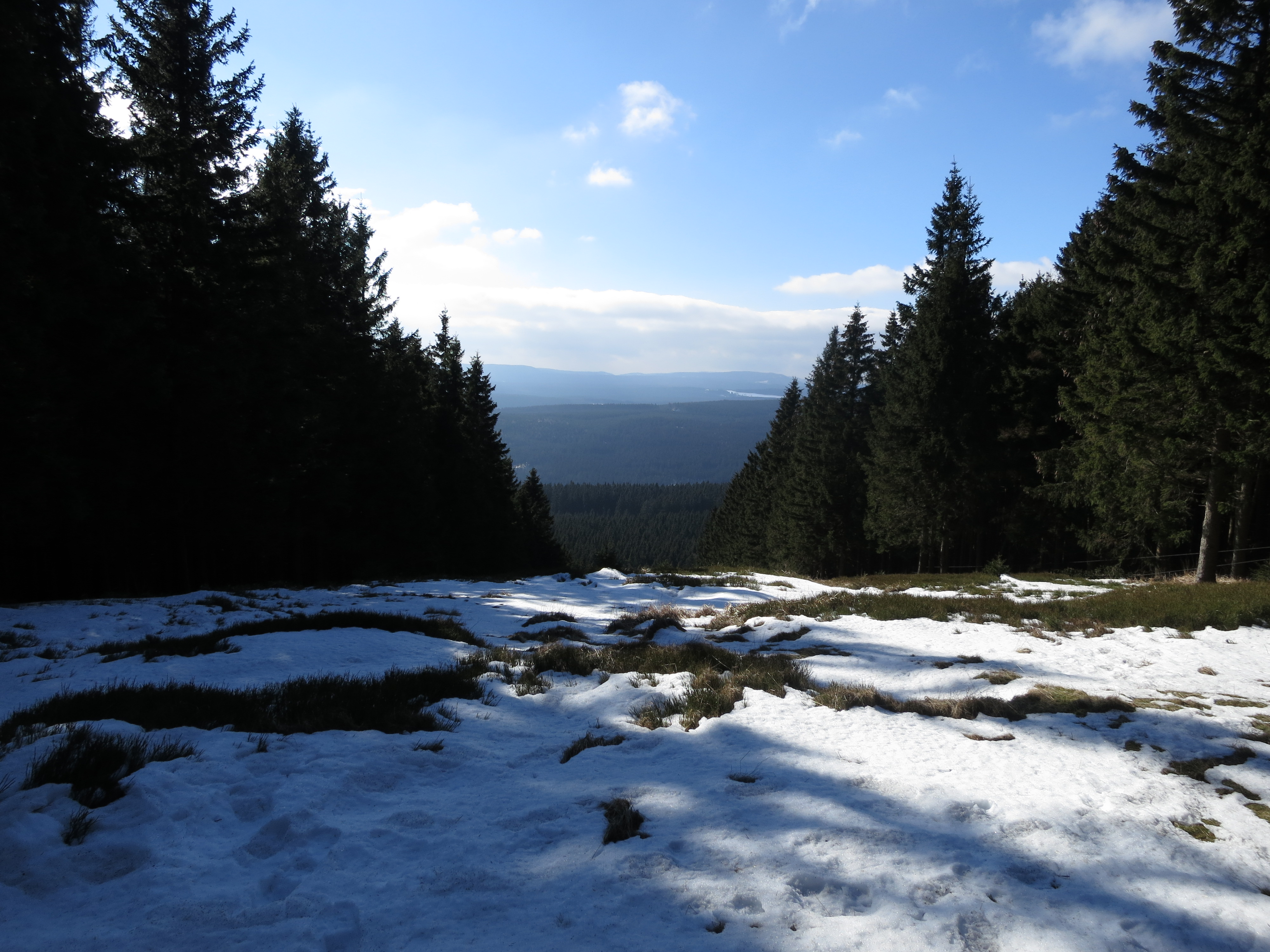 Blick vom Erdbeerkopf durch die Schneise der ehemaligen Skipiste nach Südsüdwesten.